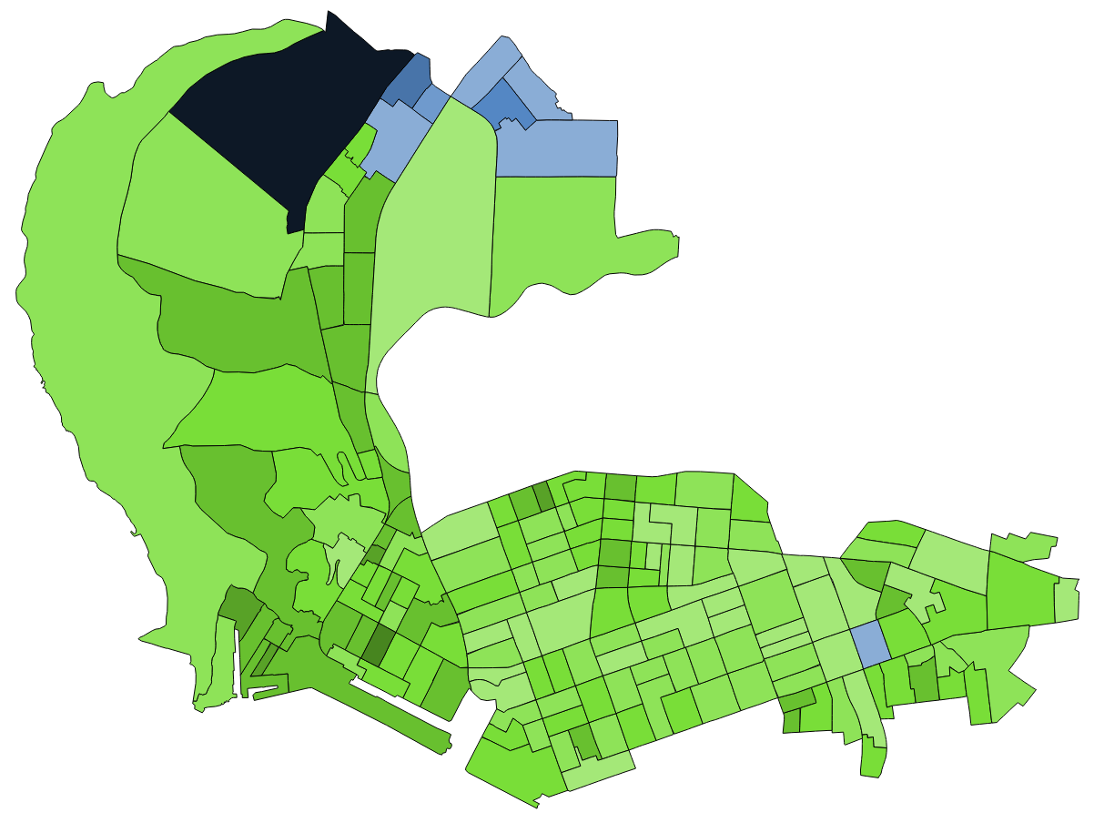 中文（台灣）: 顏色對照表